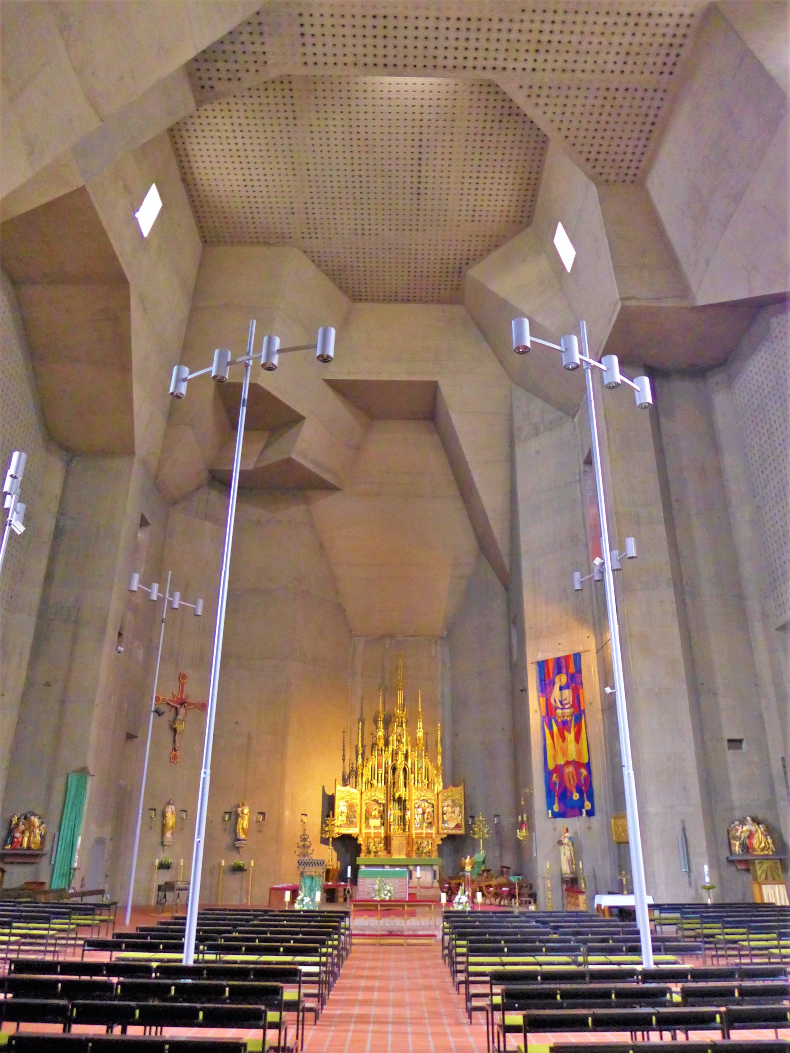 St. Ludwig (Saarlouis), Innenraum mit Blick zum Altar